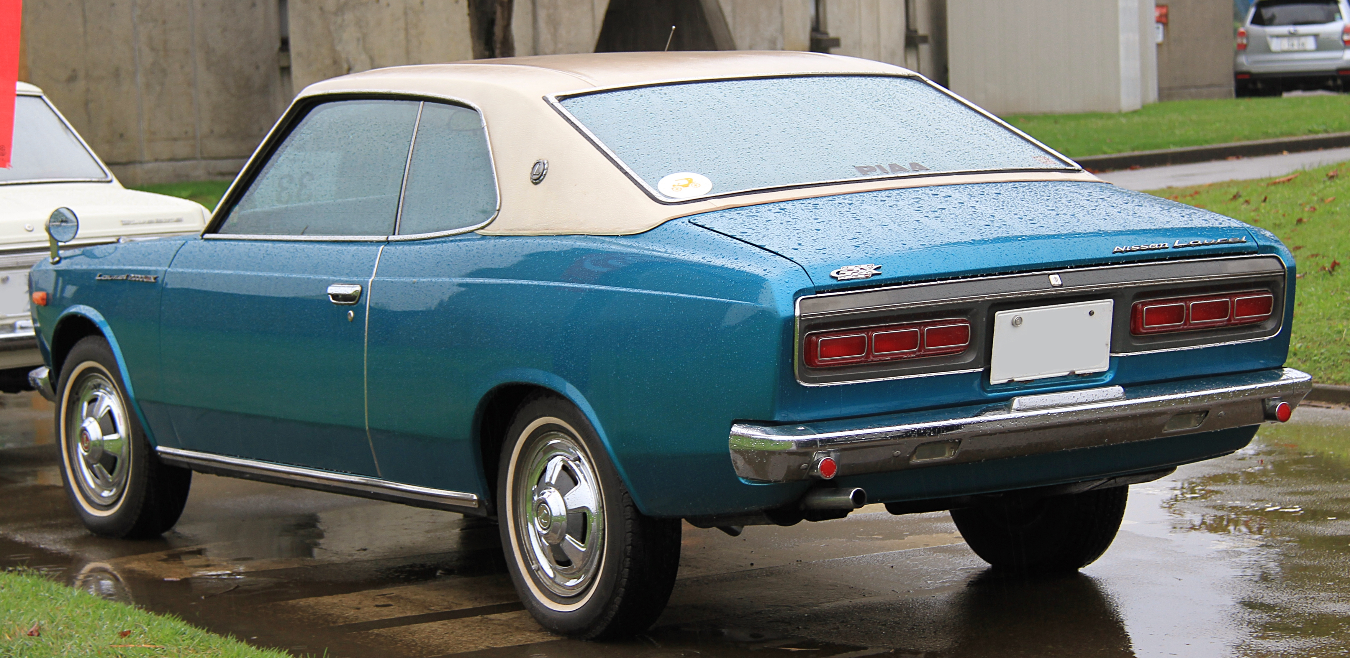 Nissan Laurel KPC30